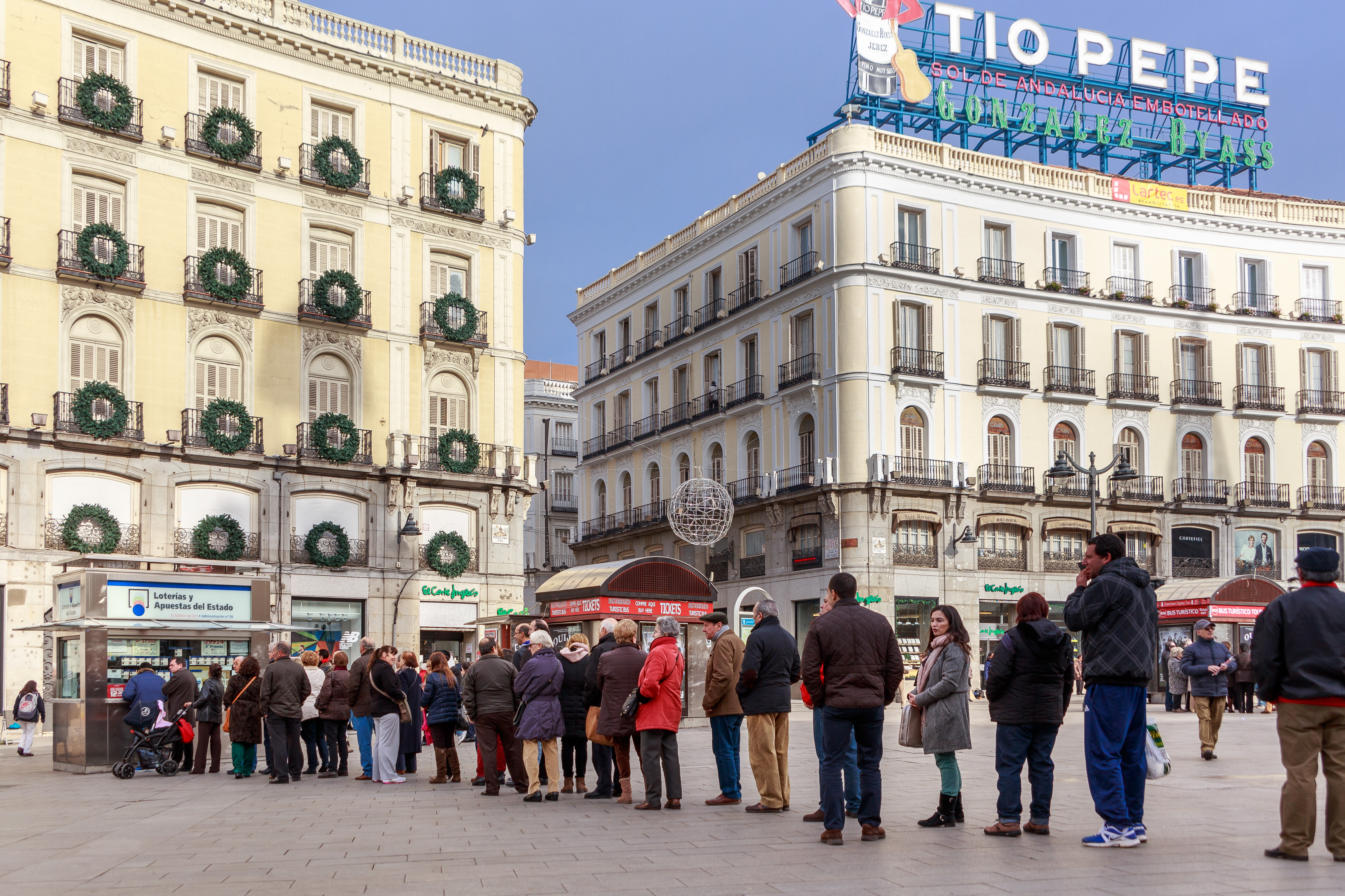 Cola para comprar billetes de lotería de navidad en la Puerta del Sol, Madrid.